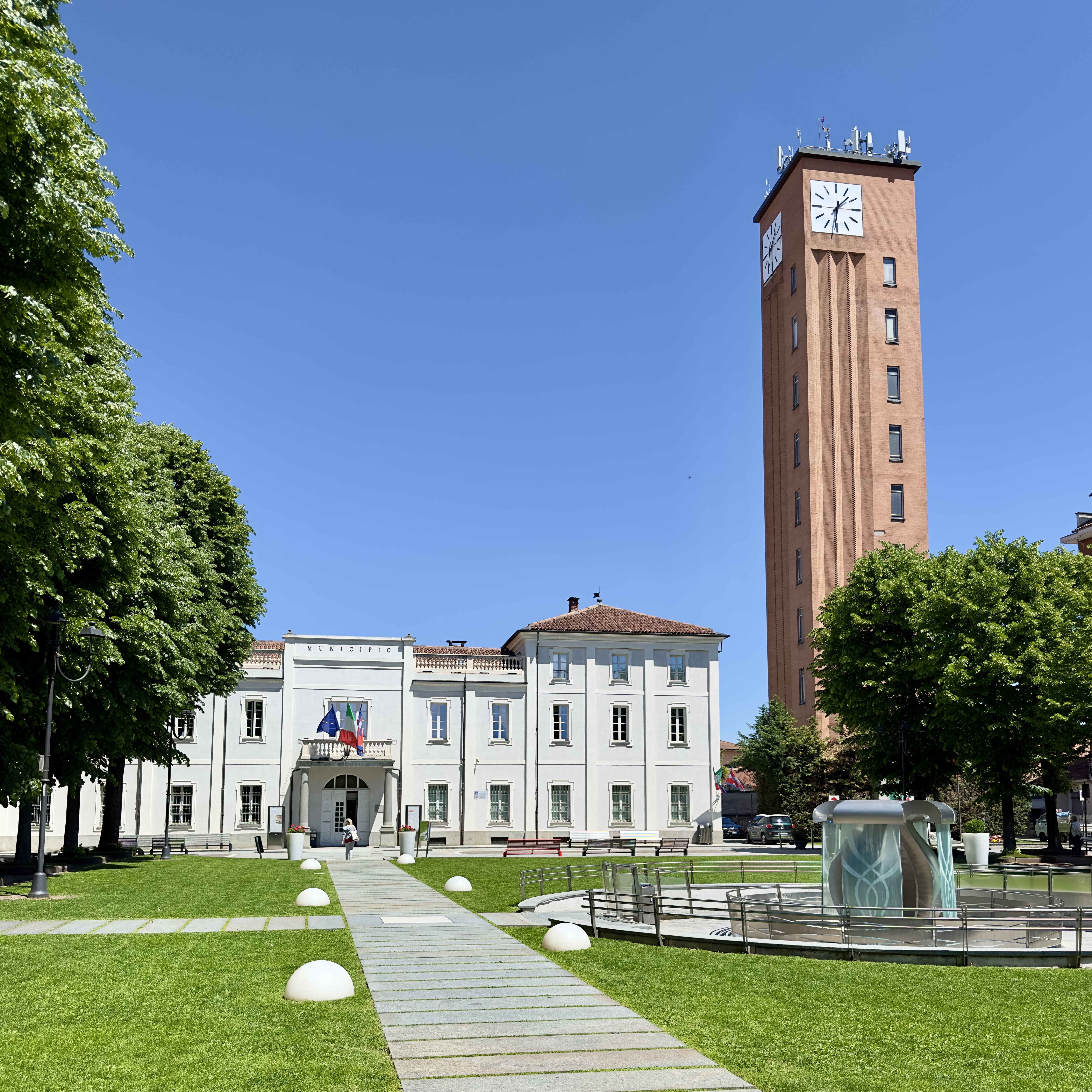 Sulla destra la torre dell'orologio, sulla sinistra scorcio di municipio